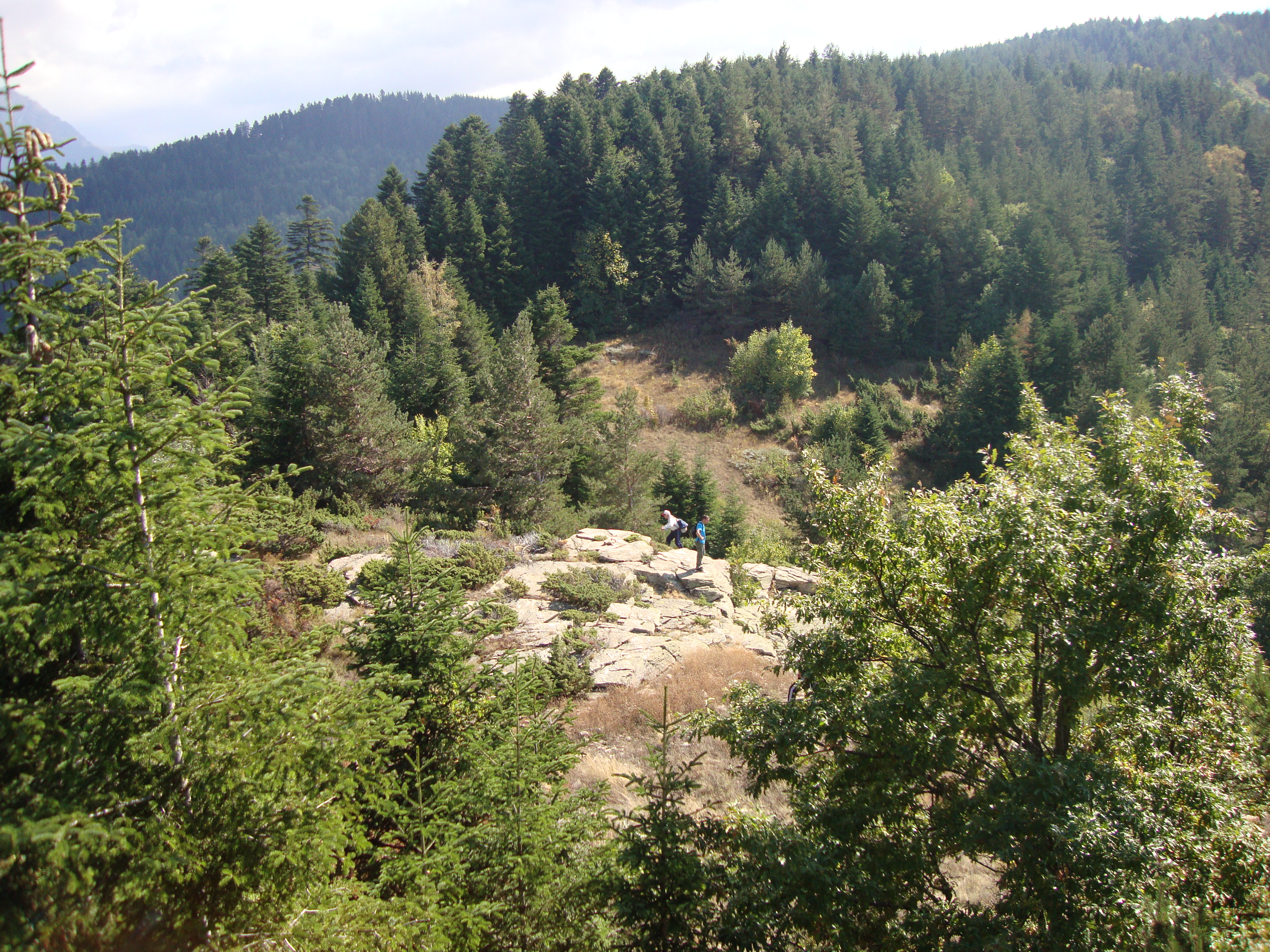 Фенерски камък (светилище)